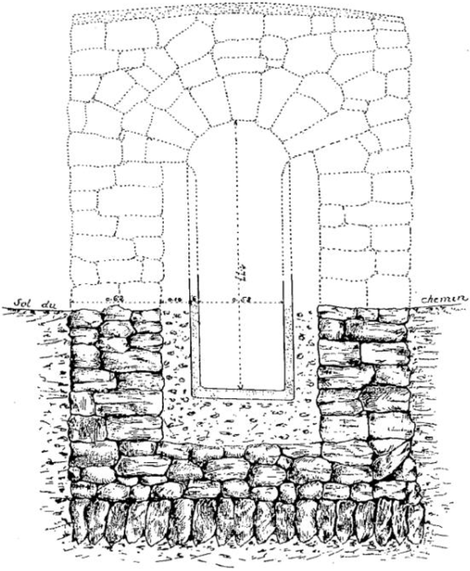 Conduite semi-enterrée, à Sainte-Foy-lès-Lyon, partie de l'aqueduc romain du Gier alimentant jadis Lugdunum en eau potable.